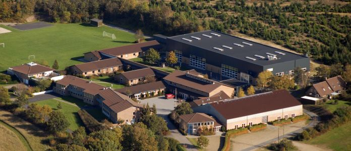 luftfoto af Bjergsnæs Efterskole, Viborg